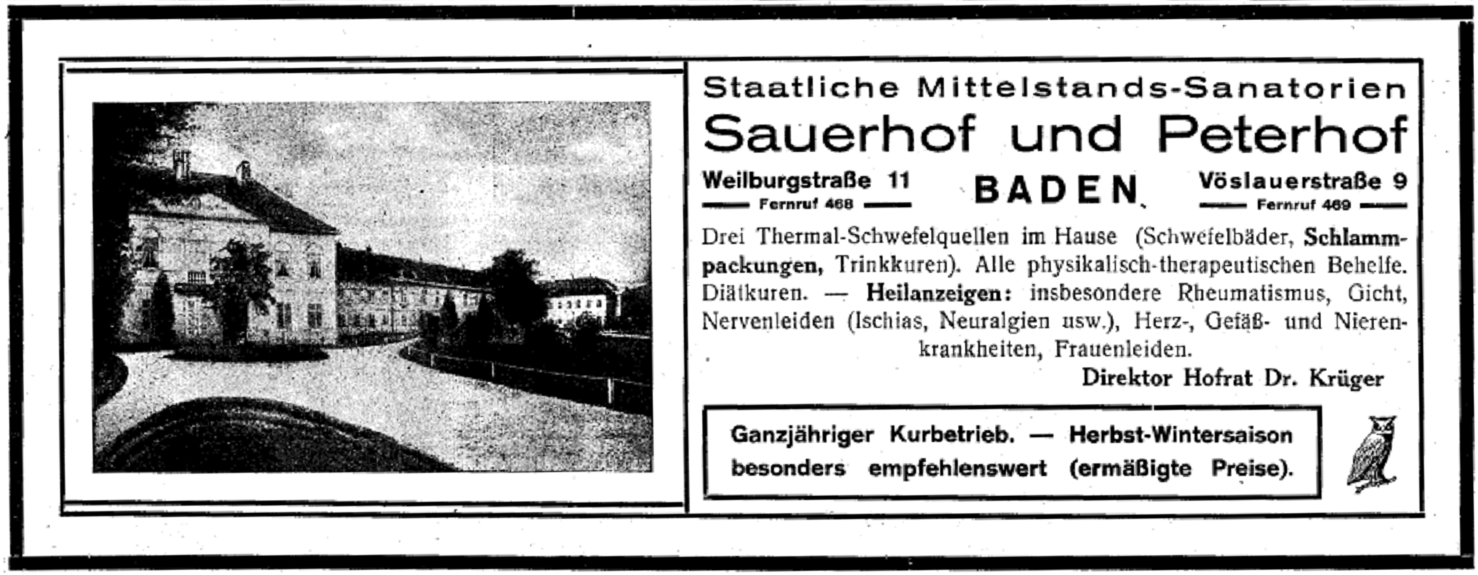 Baden bei Wien, Sauerhof und Peterhof, 1925 als Mittelstandssanatorien beworben